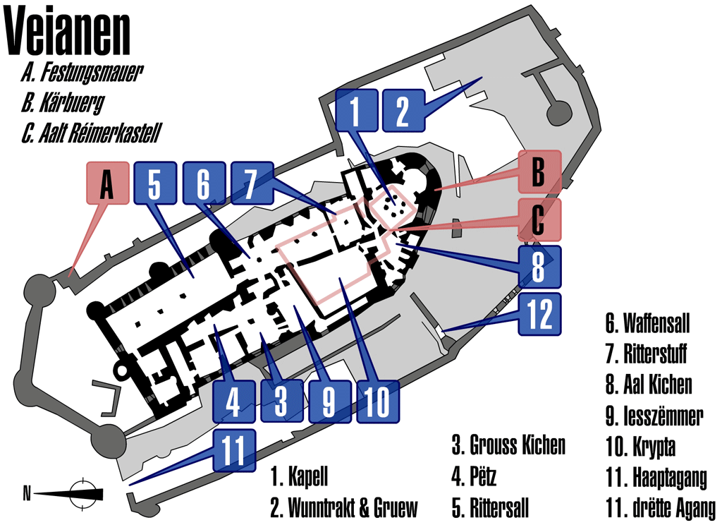 Plang vum Veianer Schlass